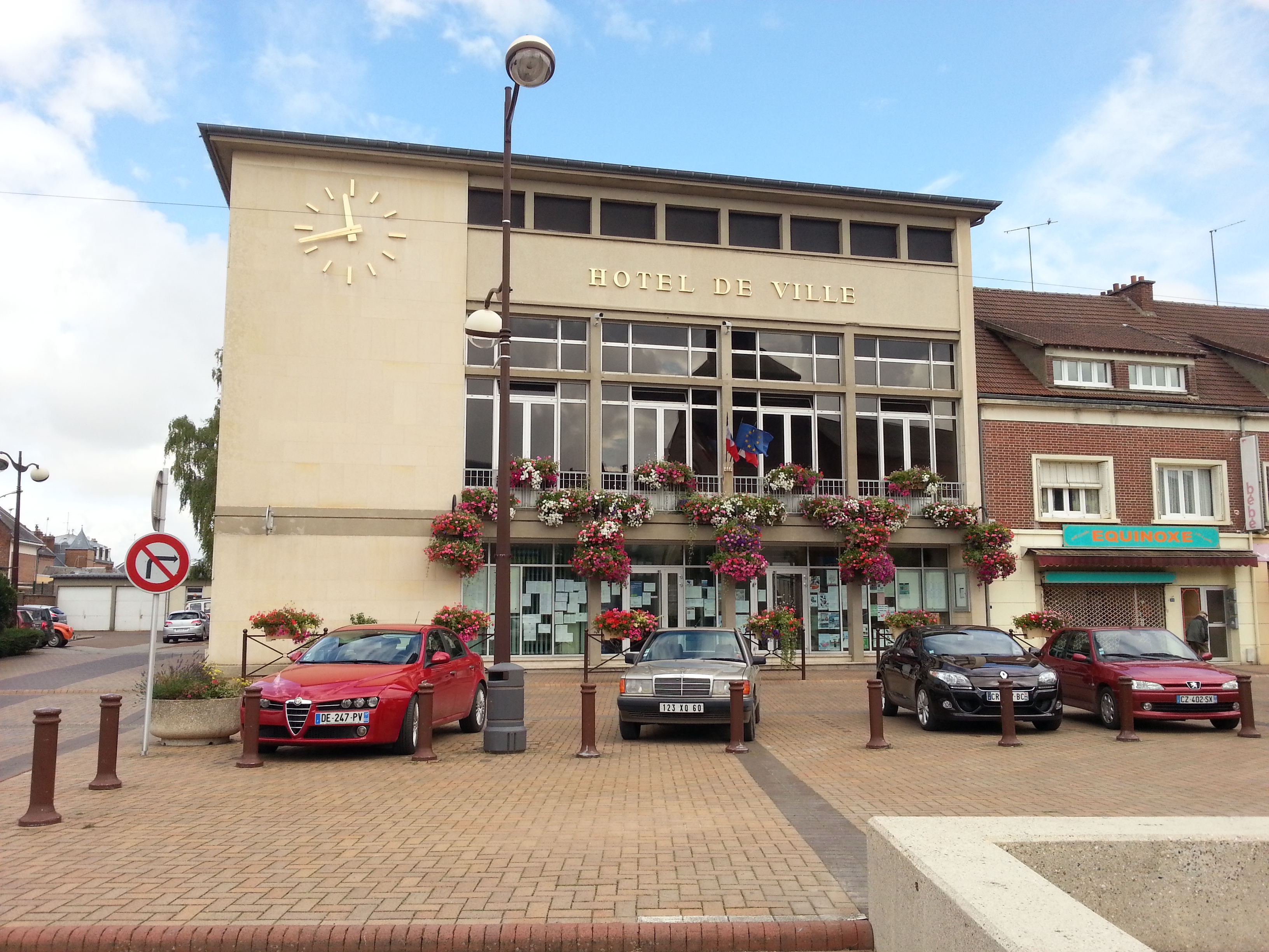 La mairie de Grandvilliers